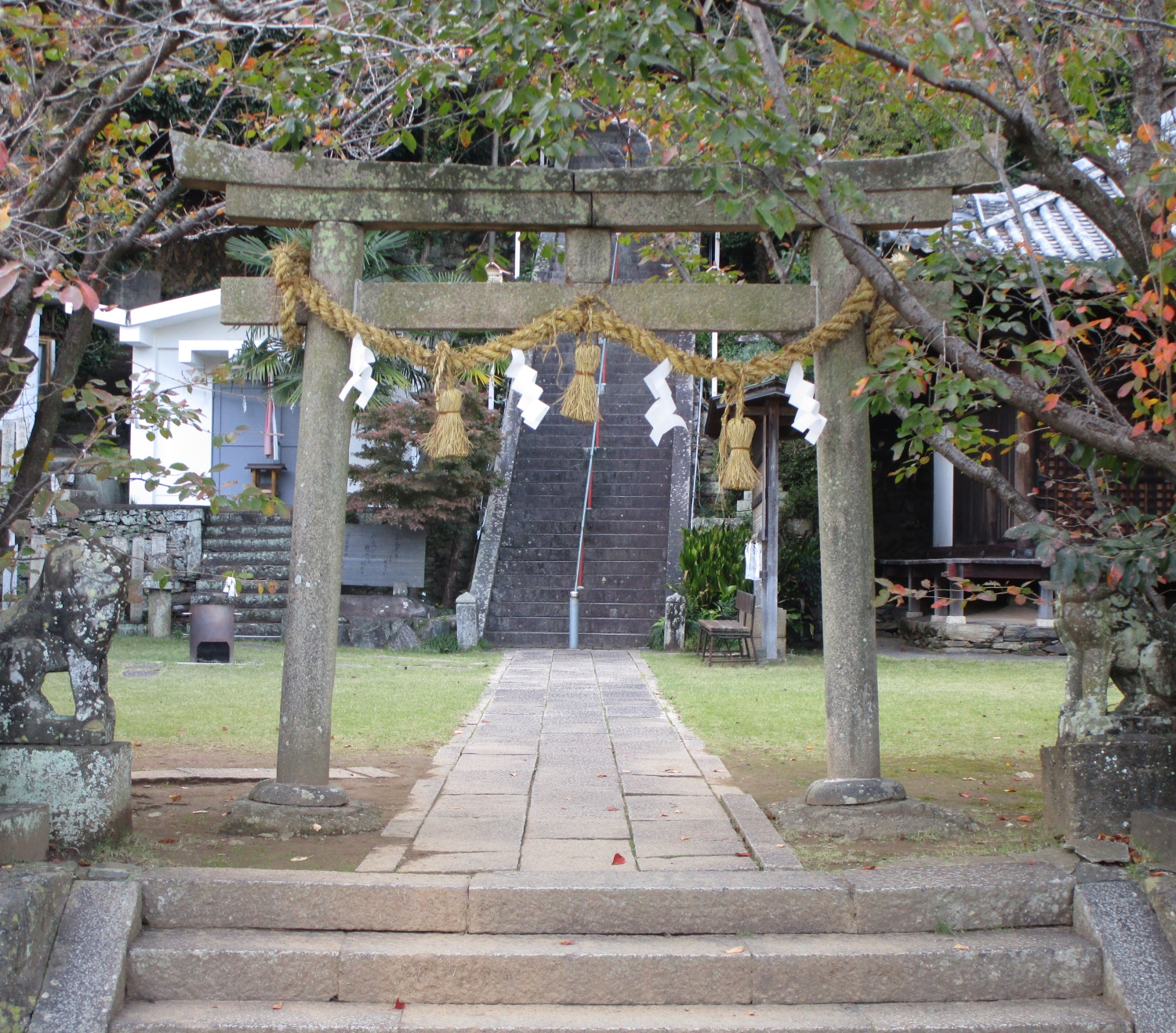 粟嶋神社の鳥居